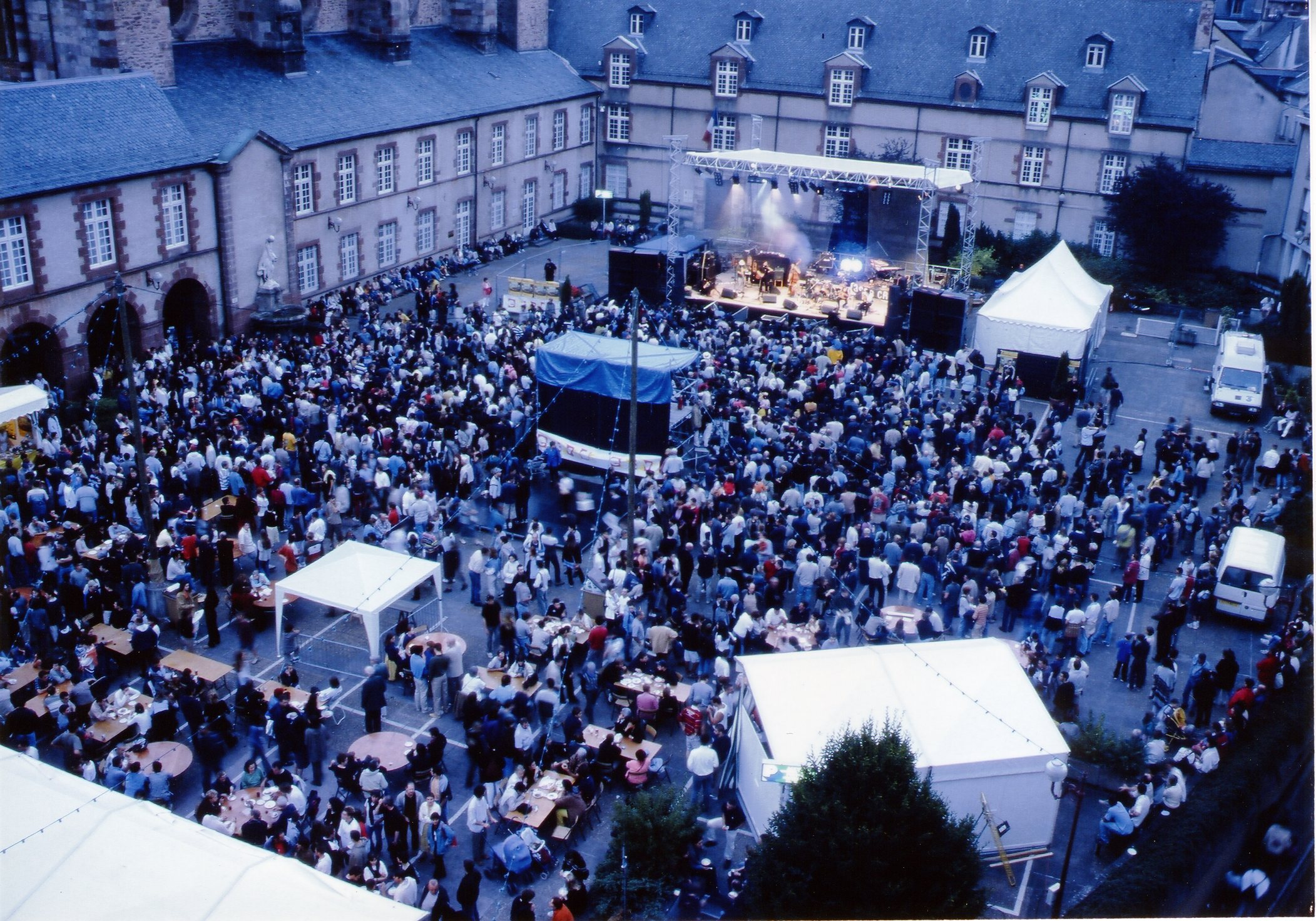 Grande Scène 2002 Place Foch